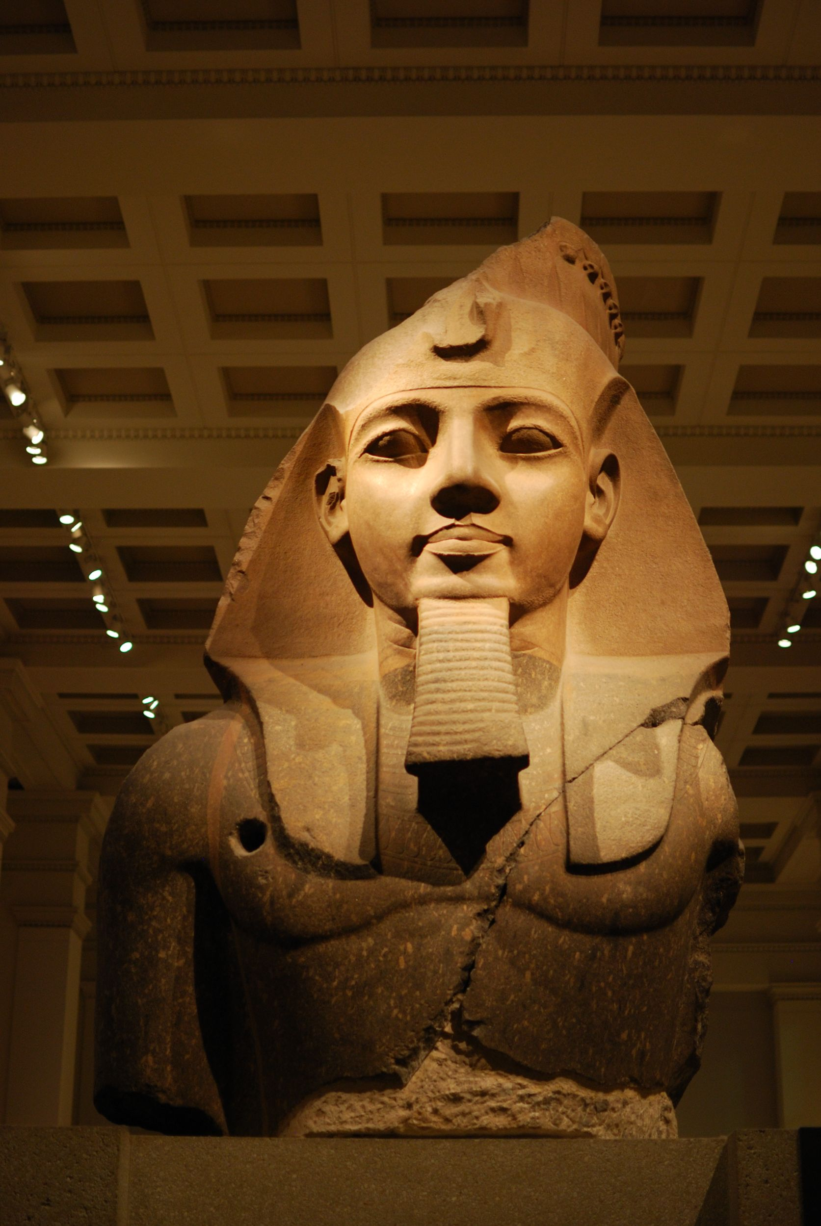 Ramesses II